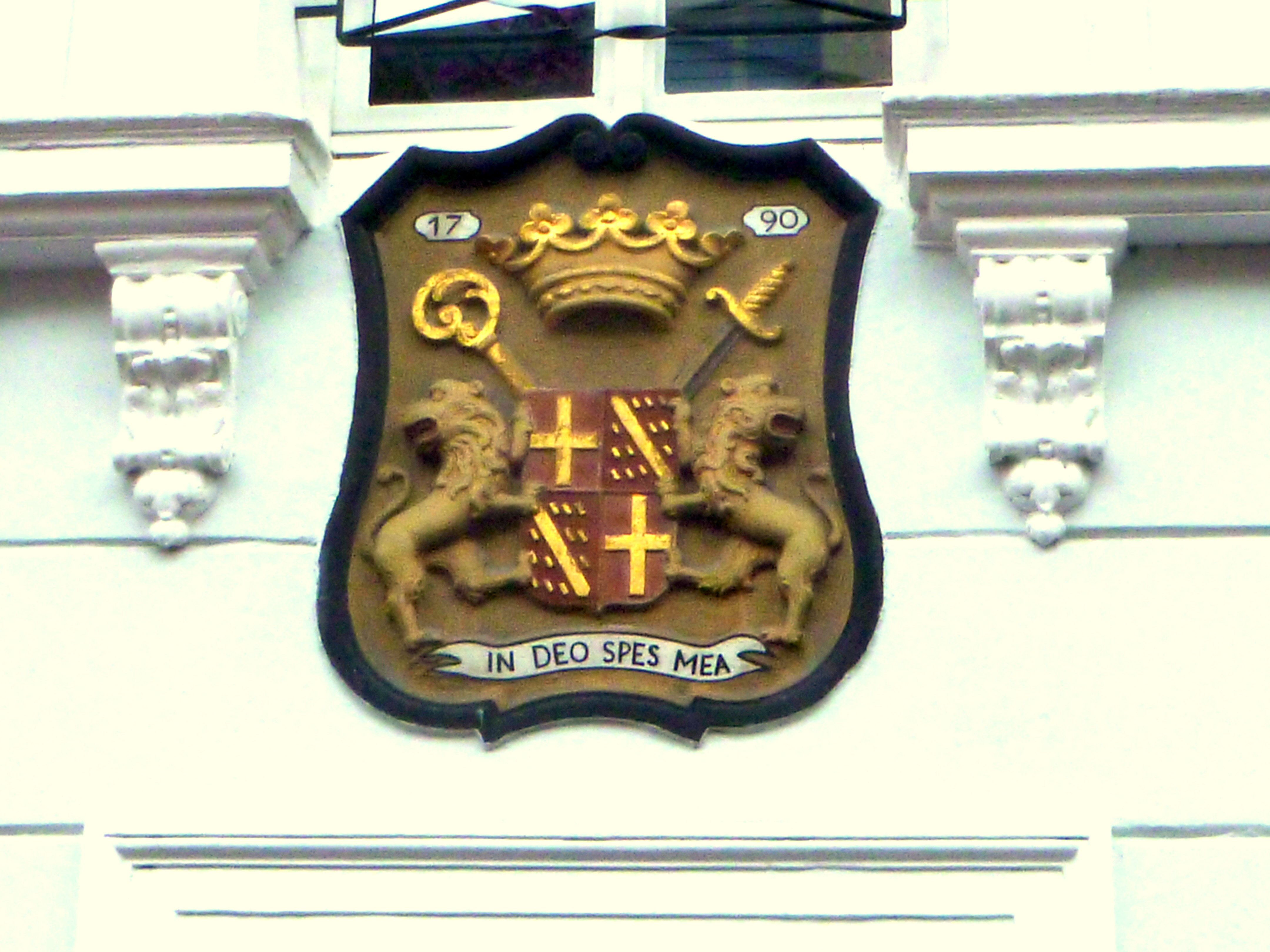 Wappen der Äbtissin Maria Josephina von Eys gen. Beusdael von Zweibrüggen der Abtei Burtscheid, eingesetzt im Haus Burtscheider Markt 17, Aachen-Burtscheid